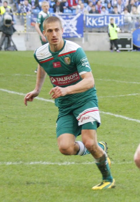 Polski piłkarz Piotr Celeban